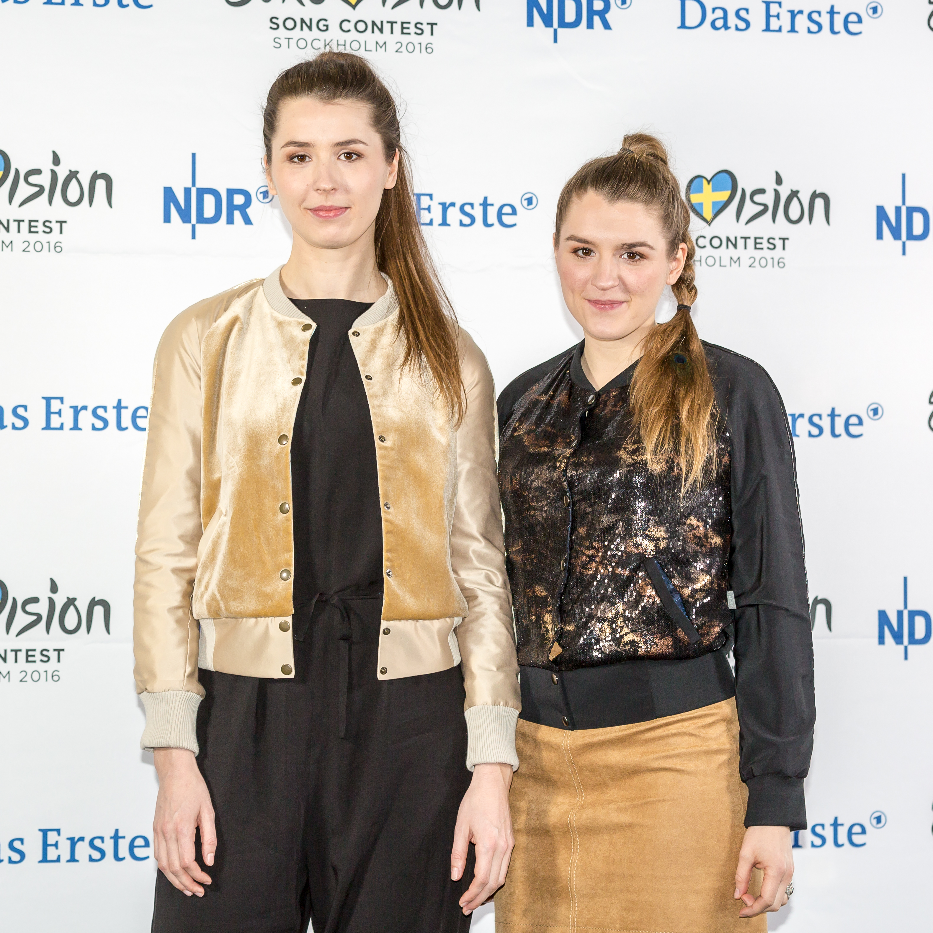 Unser Lied für Stockholm - Pressekonferenz am Probentag: Joco - Josepha Carl und Cosima Carl